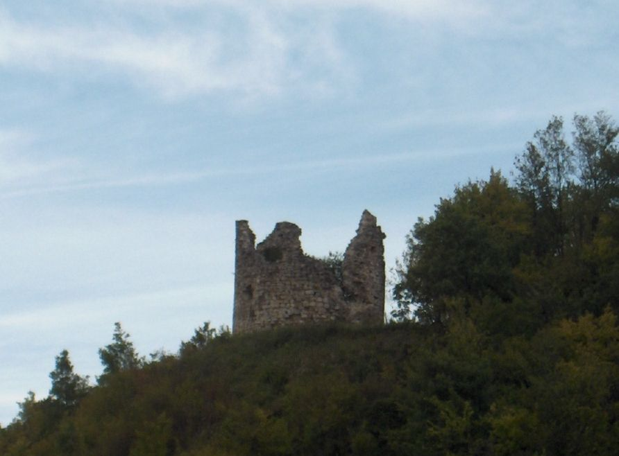 Branič kula Čuntić grada